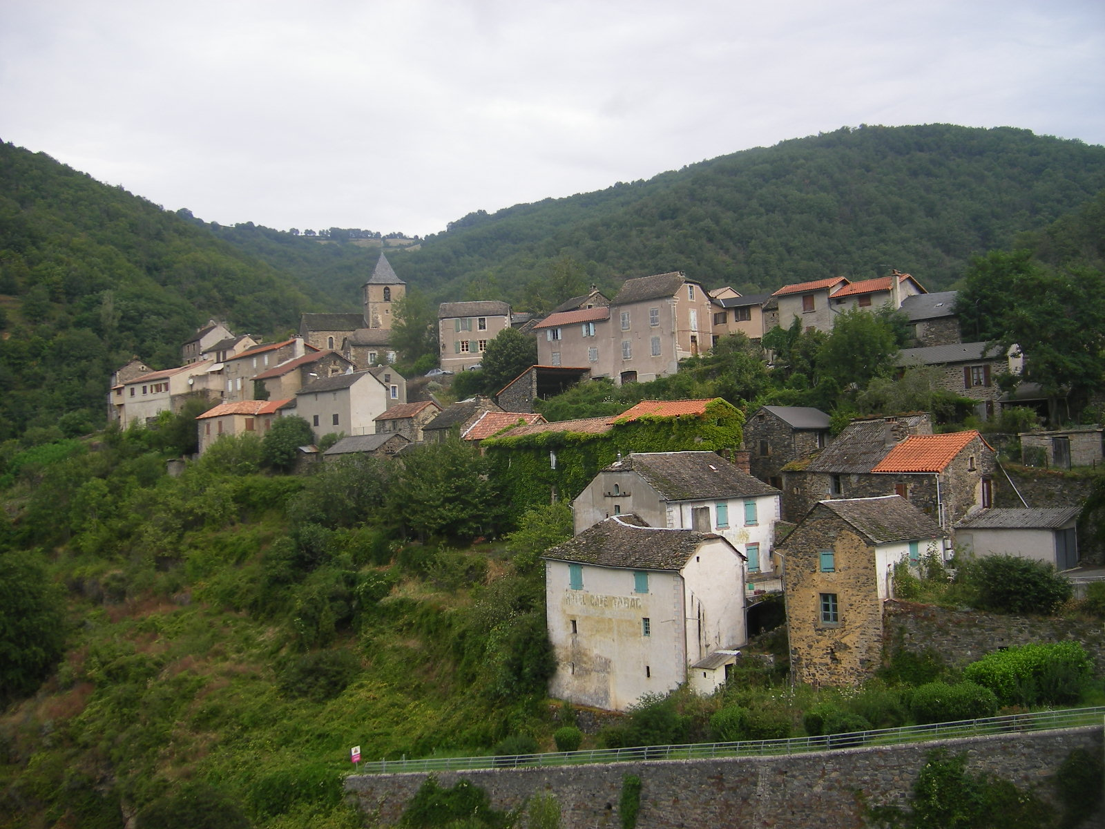 Pinet (commune Viala-du-Tarn)